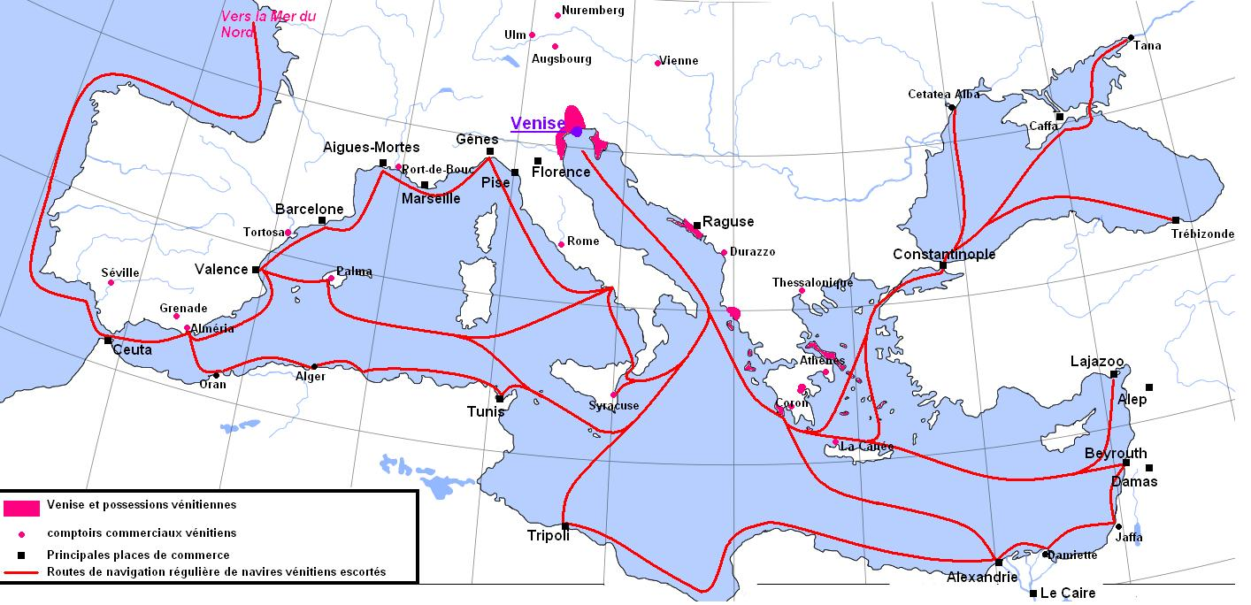 Le commerce medieval de Venise.